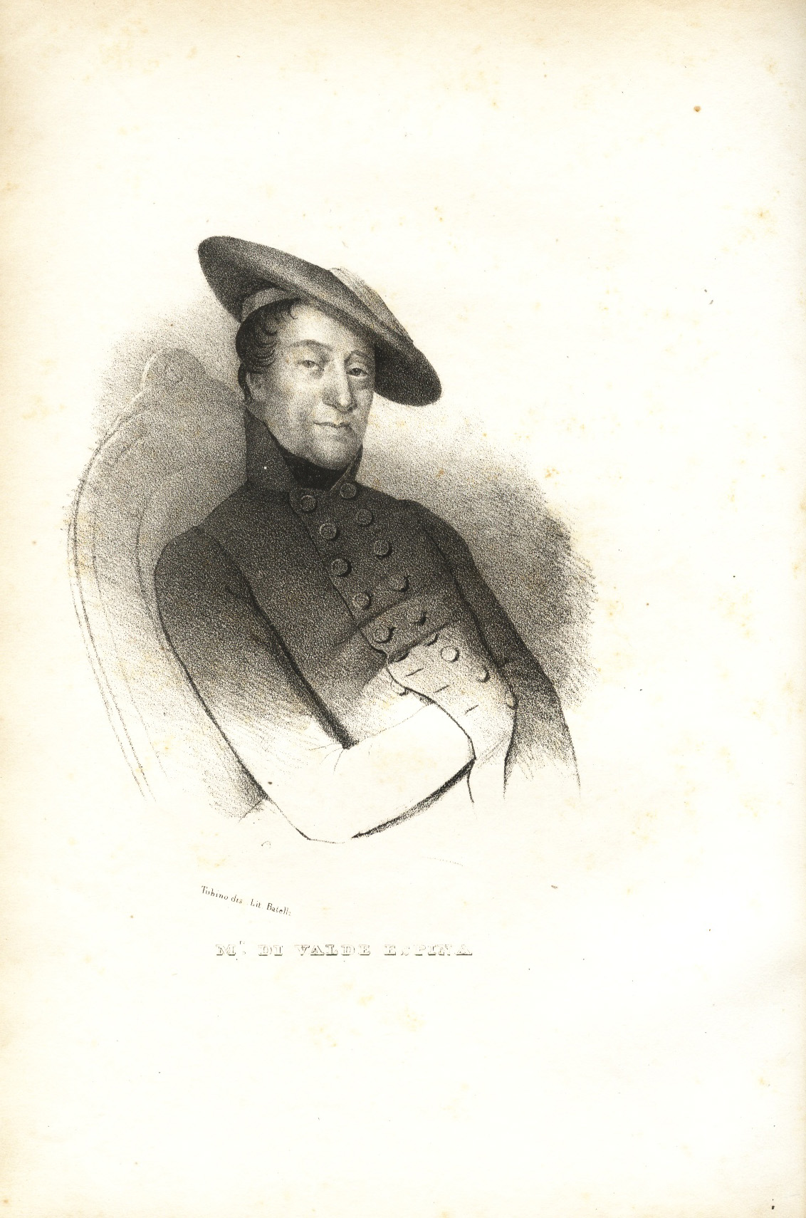 José María de Orbe y Elío. Marqués de Valdespina. "Don Carlos e i suoi difensori". Firenze 1837